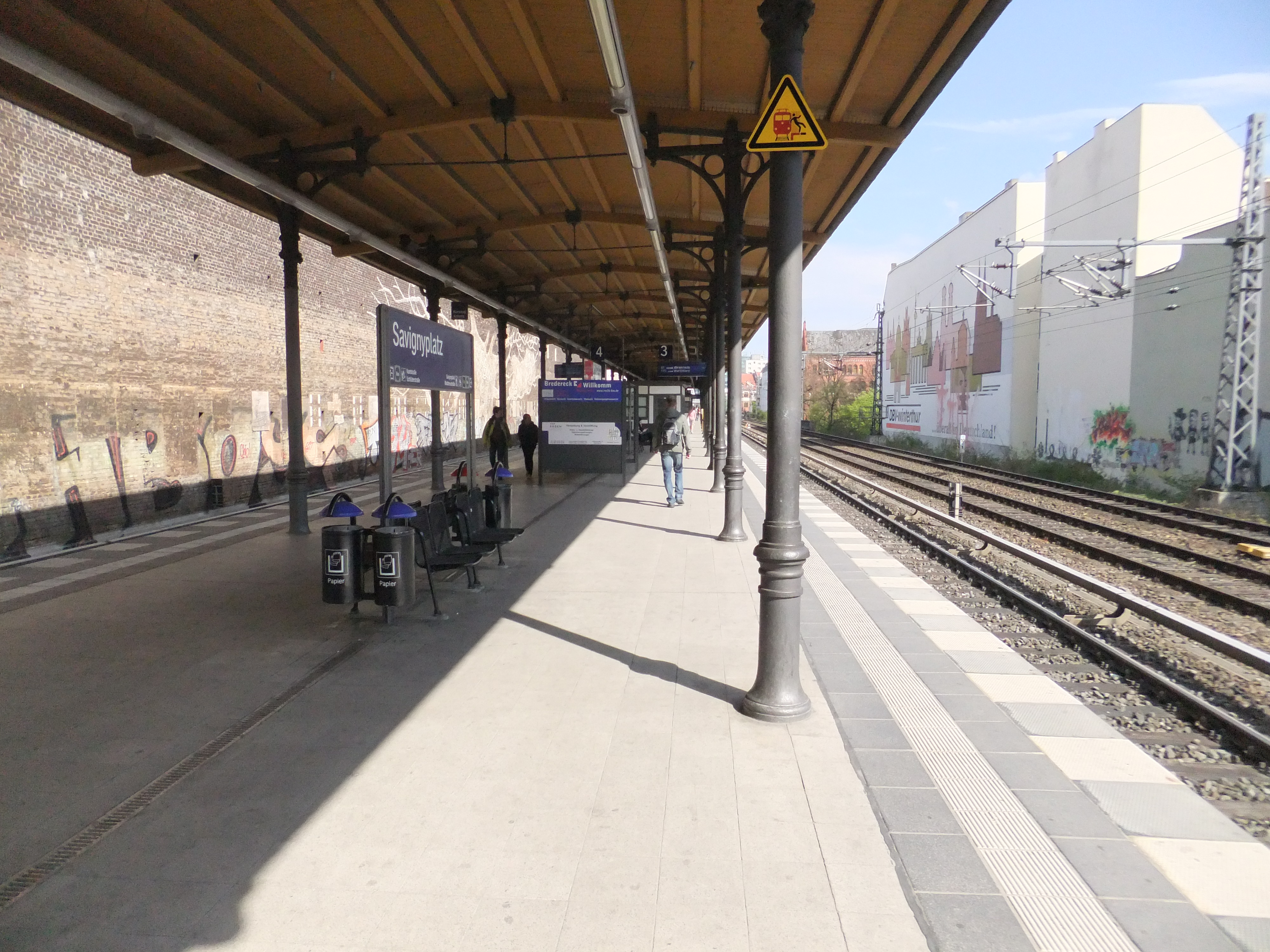 Die Bahnsteige des Bahnhofs Berlin Savignyplatz